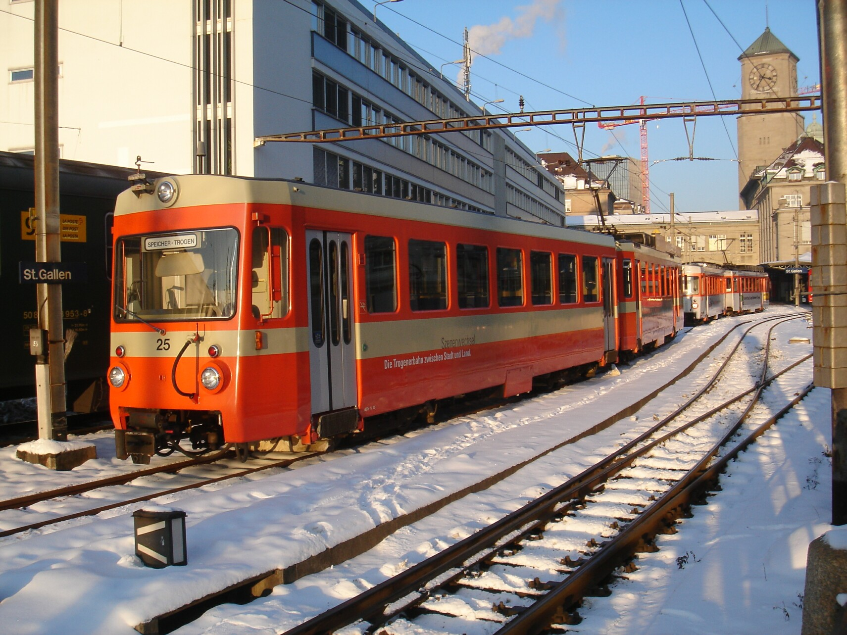 Be 4/8 25 (abgebrochen 2008) und 21 (2009 verkauft an Rittnerbahn) der Trogenerbahn (heute Appenzeller Bahnen) im St. Galler Nebenbahnhof